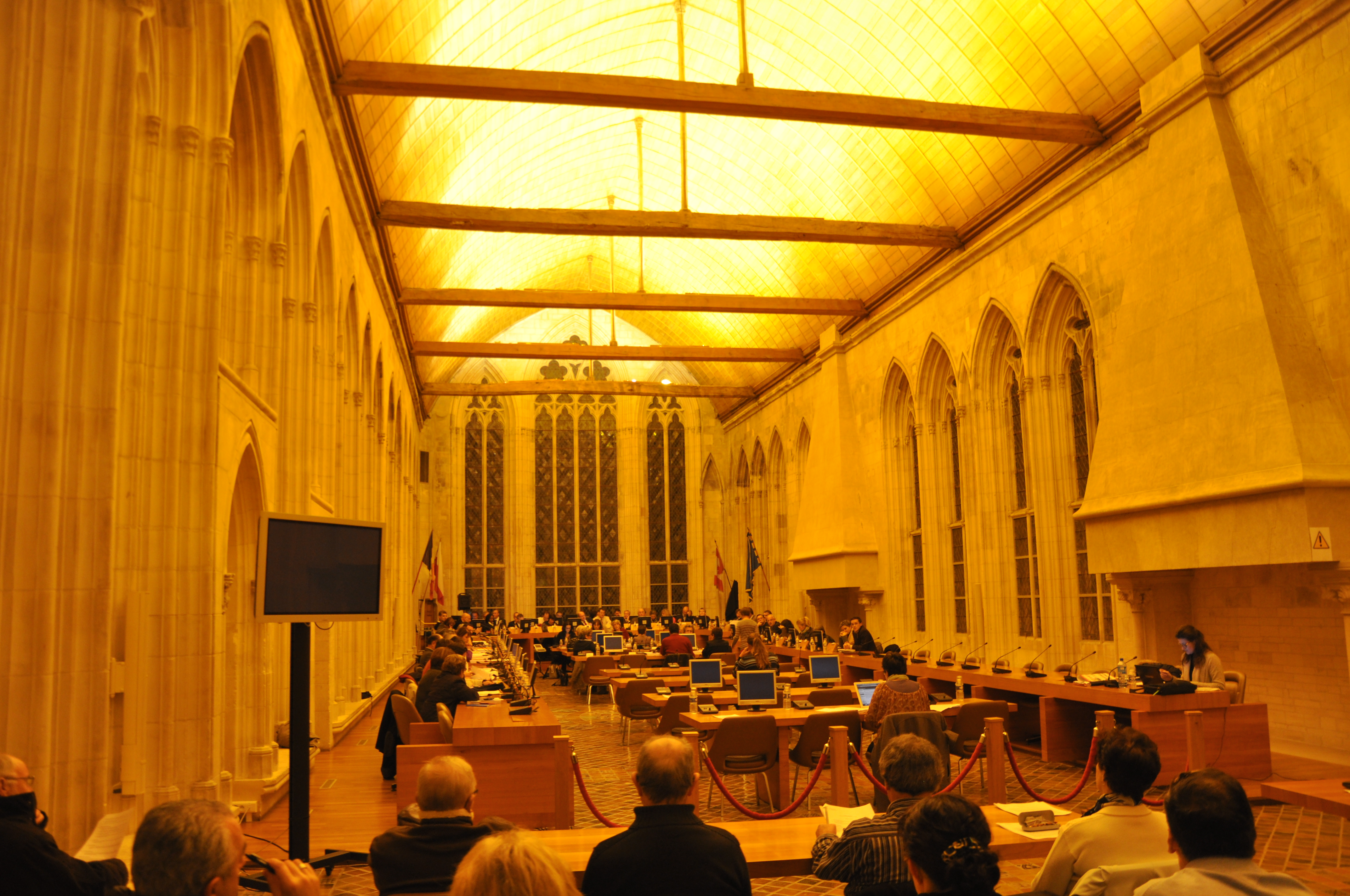 Séance du conseil municipal de Caen le 12 novembre 2012